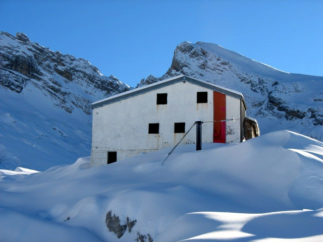 Vue du refuge l'hiver